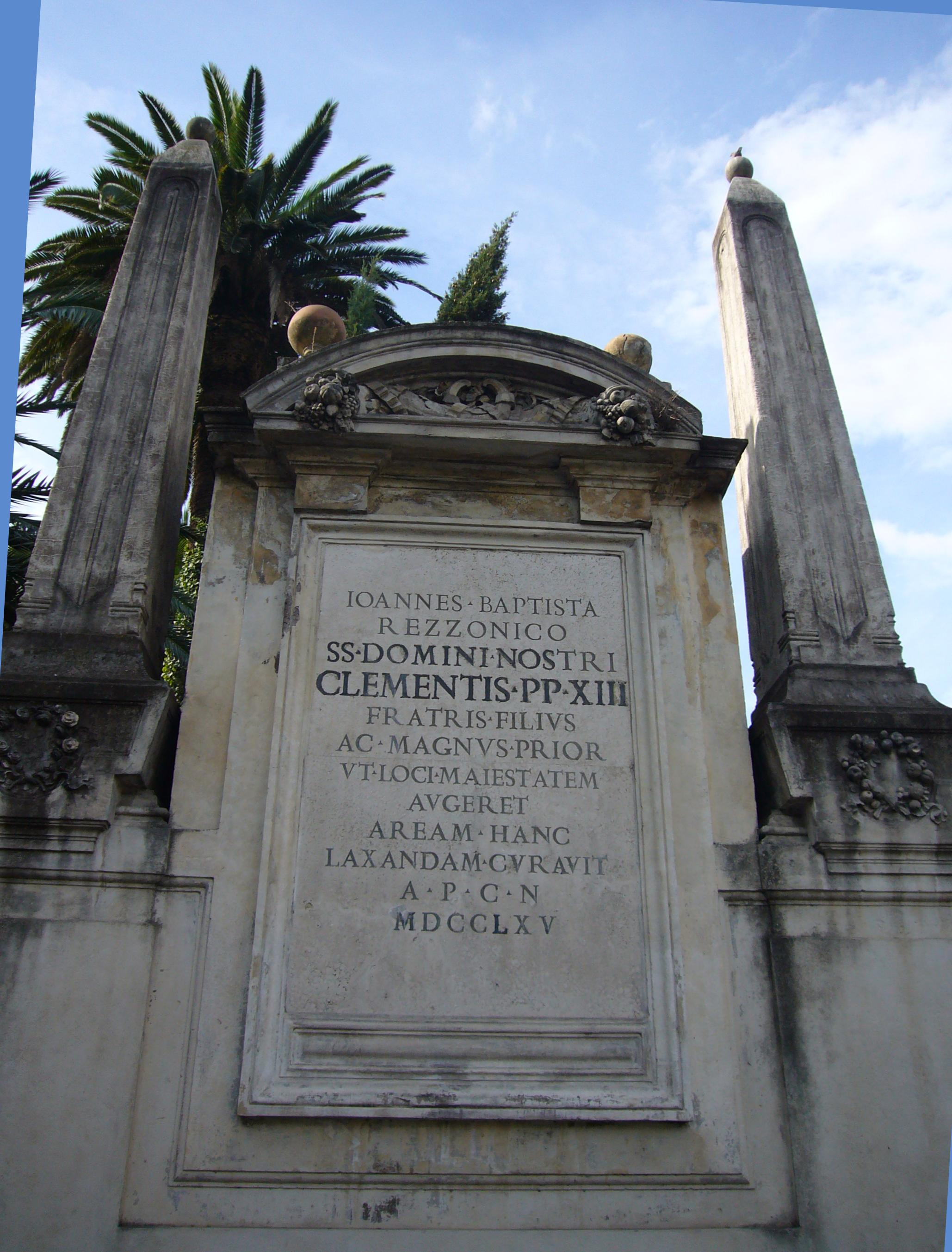 Roma, piazza dei Cavalieri di Malta: memoria del cardinale Giovanni Battista Rezzonico, committente del Piranesi per i lavori di ristrutturazione della villa e della chiesa